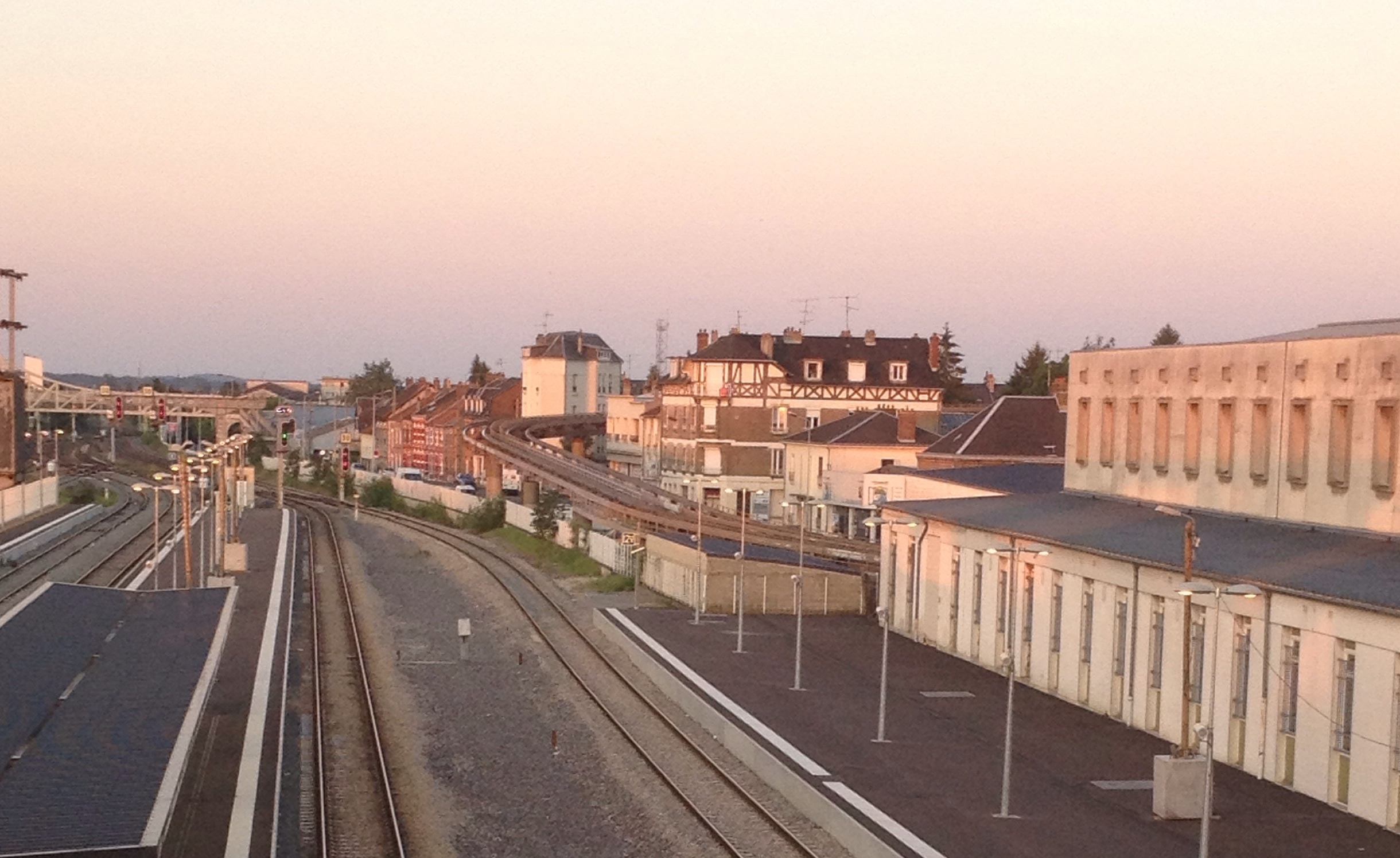 Les voies du POMA à proximité de la gare de Laon